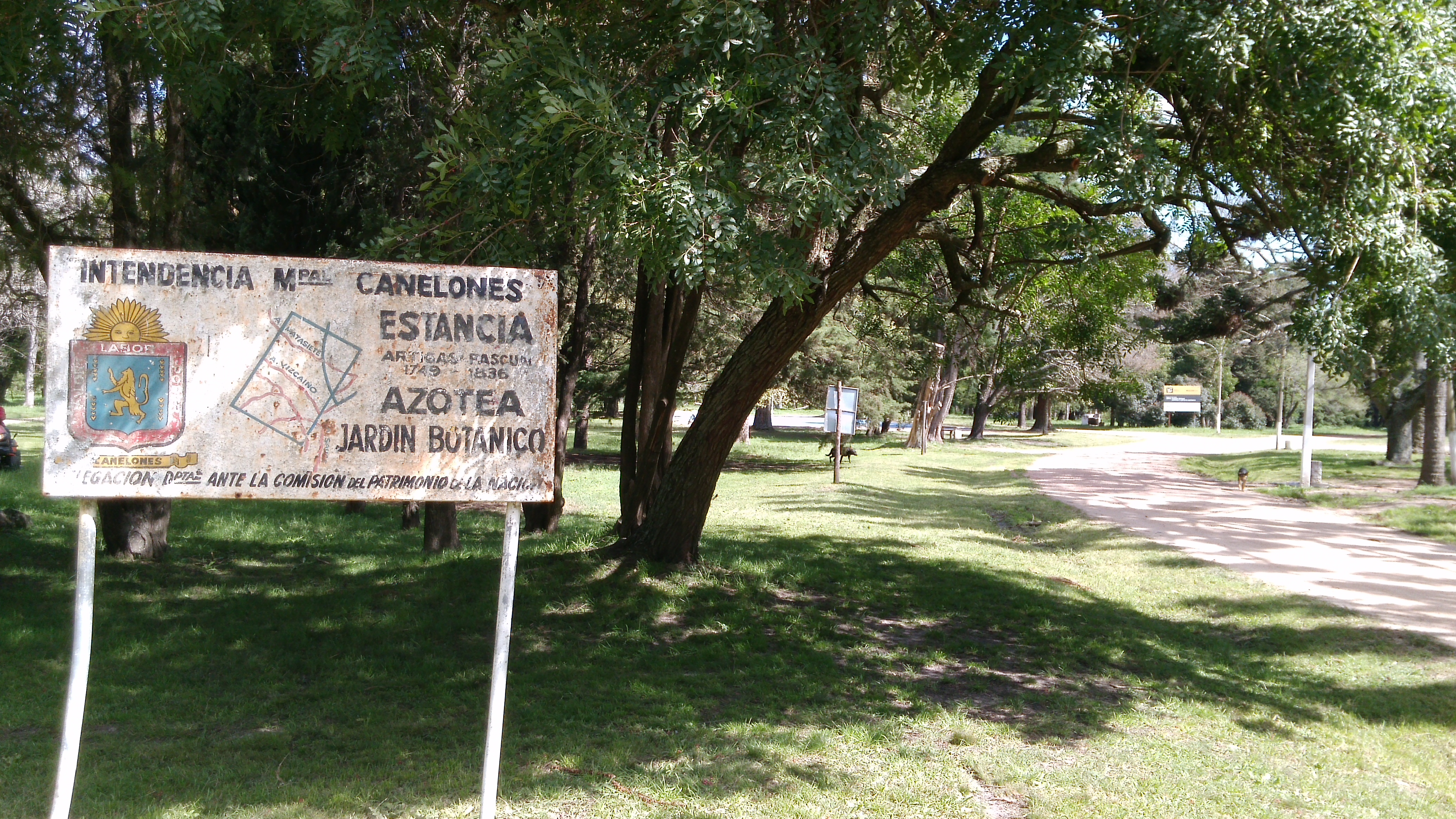 Entrada al Parque Artigas de Sauce, Canelones, Uruguay